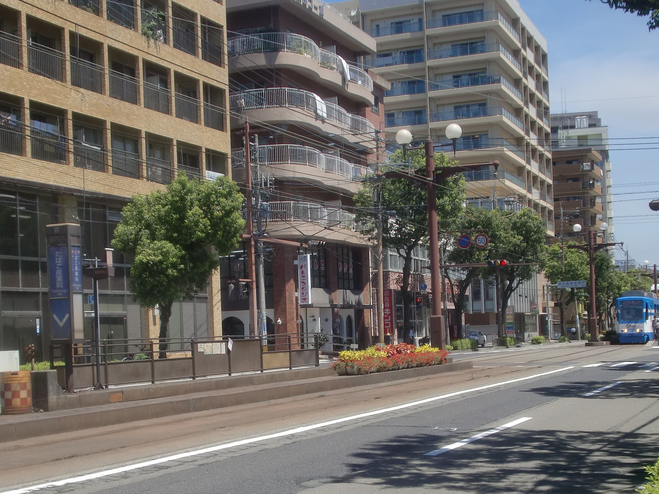 たばこ産業前駅の外観。